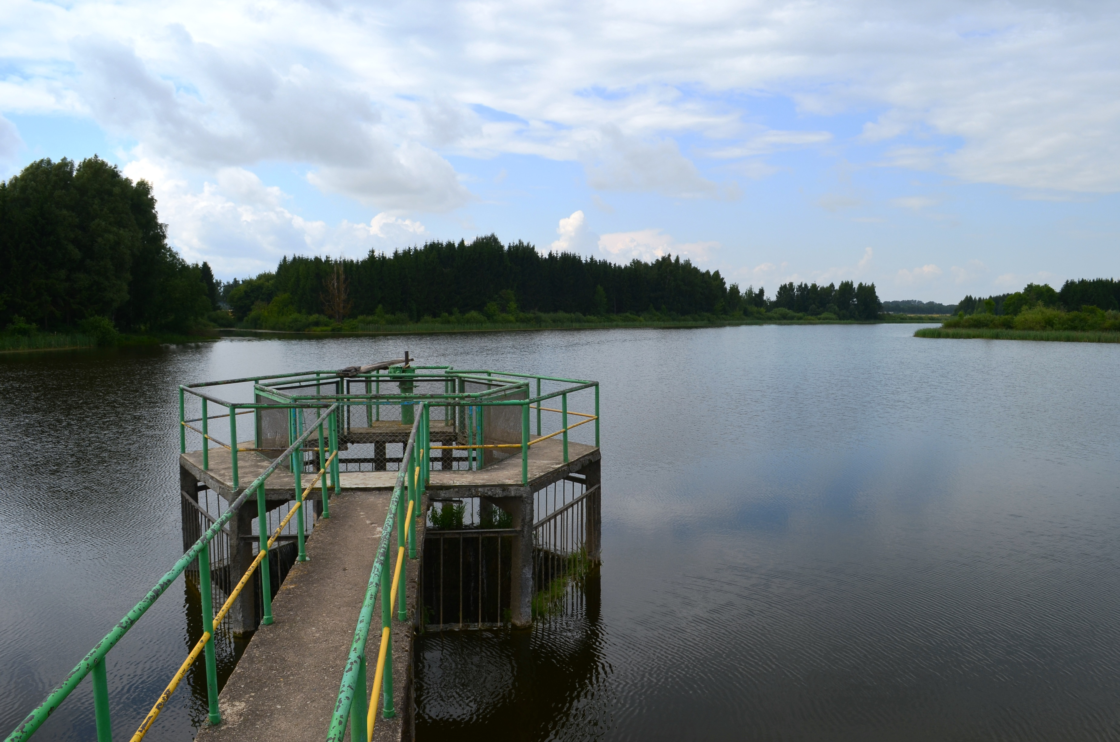 Vaidatonių tvenkinio vandens šachta, Kėdainių raj.